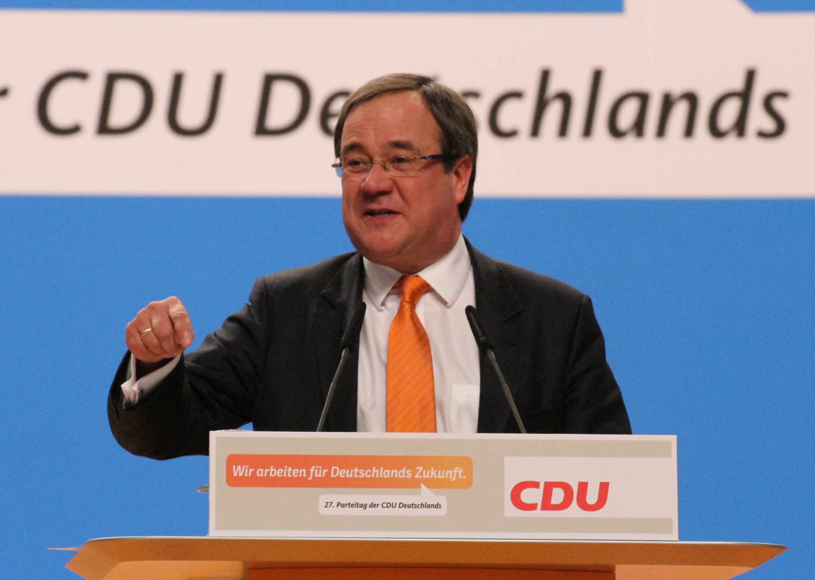 Armin Laschet auf dem CDU Bundesparteitag Dezember 2014 in Köln